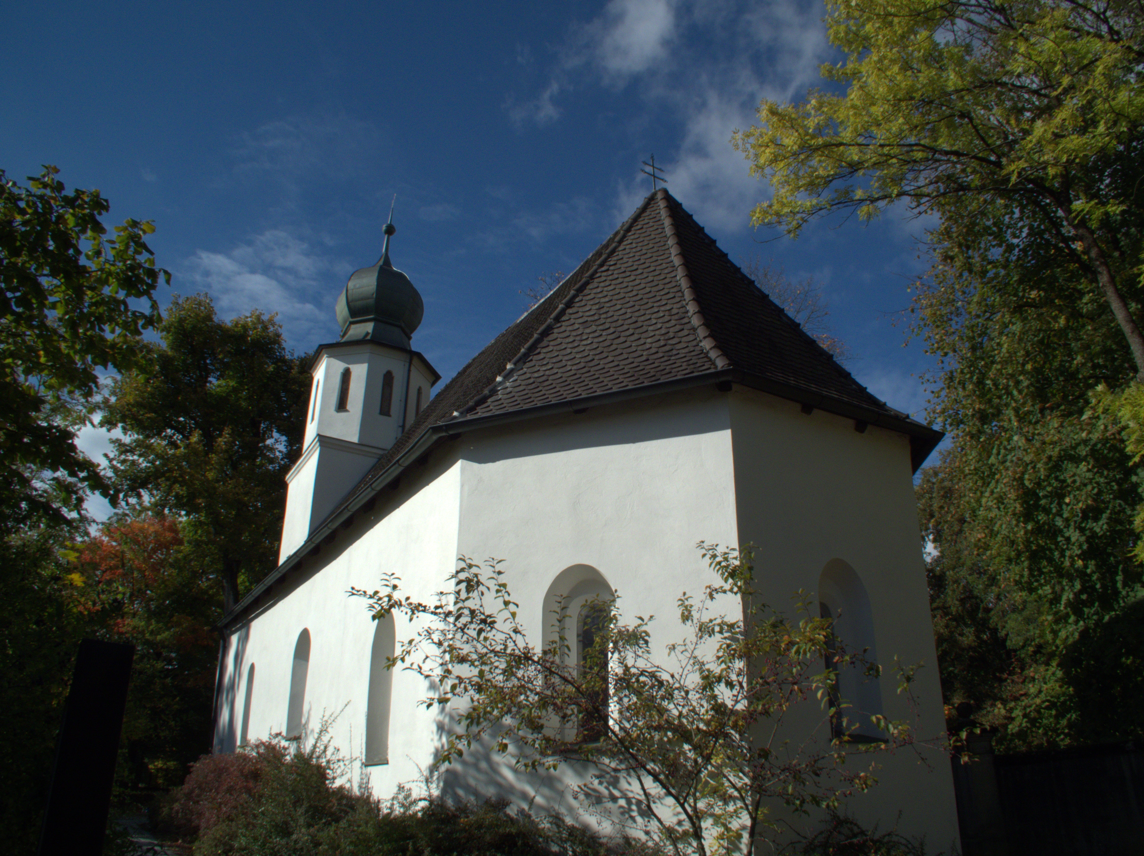 Schloßkirche / Schloßkapelle St. Margaretha in Woffenbach